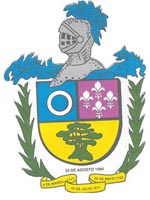 zamora